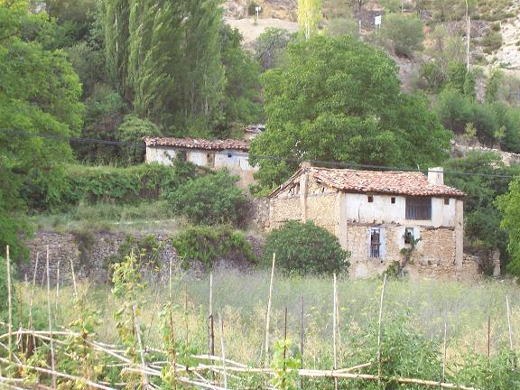 Molinos en el barranco del río Bohílgues, Vallanca, Rincón de Ademuz, Valencia.